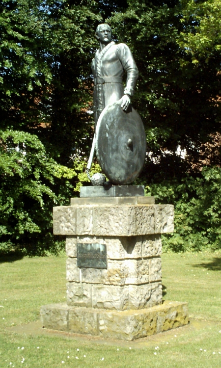 Friesendenkmal in Rodenkirchen (Gemeinde Stadland/Niedersachsen/Deutschland)